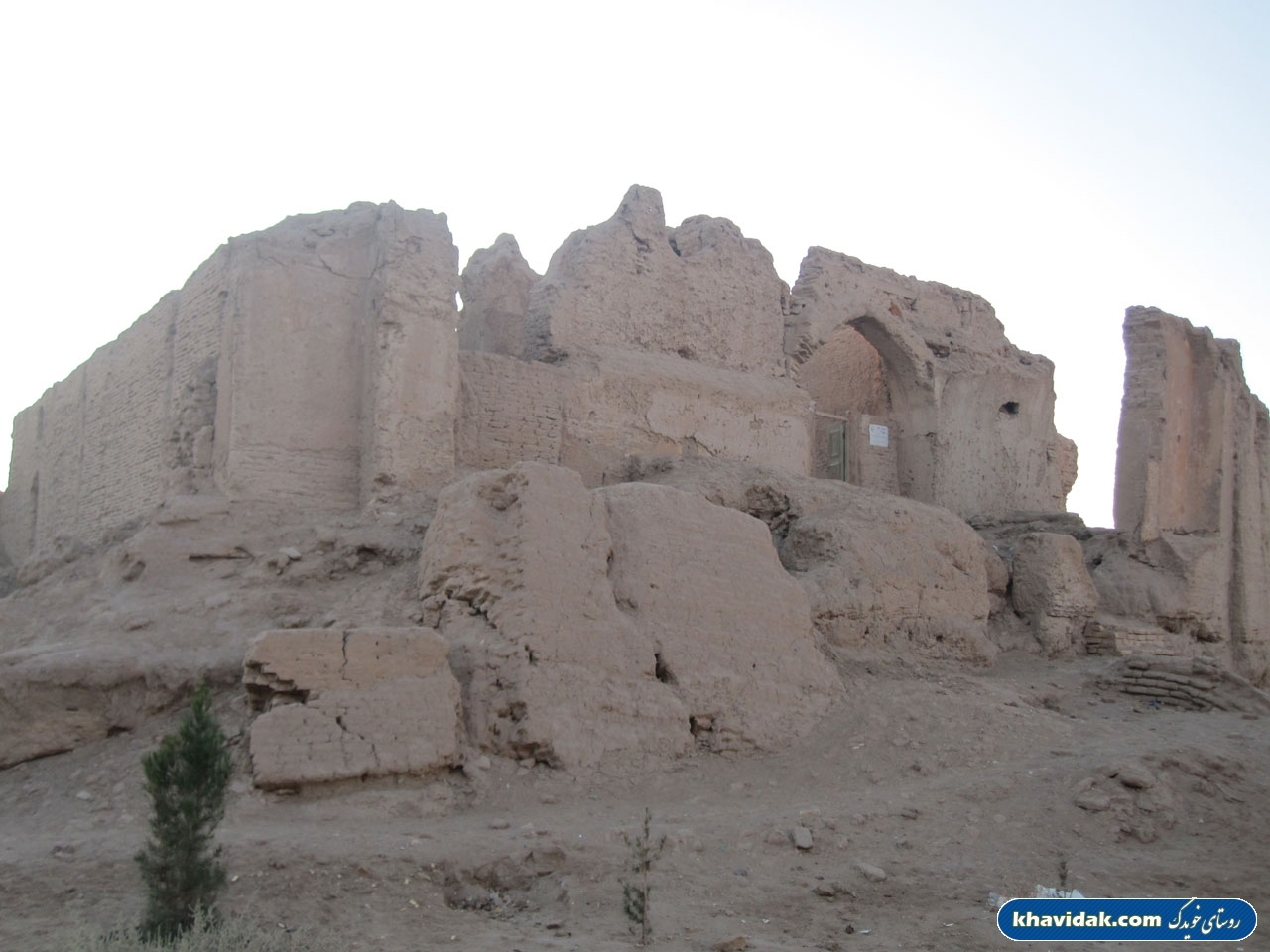 مسجد جامع خویدک مربوط به سده‌های اولیه دوران‌های تاریخی پس از اسلام است و در شهرستان یزد، بخش مرکزی، روستای خویدک واقع شده و این اثر در تاریخ ۱۲ تیر ۱۳۸۴ با شمارهٔ ثبت ۱۲۰۵۸ به‌عنوان یکی از آثار ملی ایران به ثبت رسیده است.